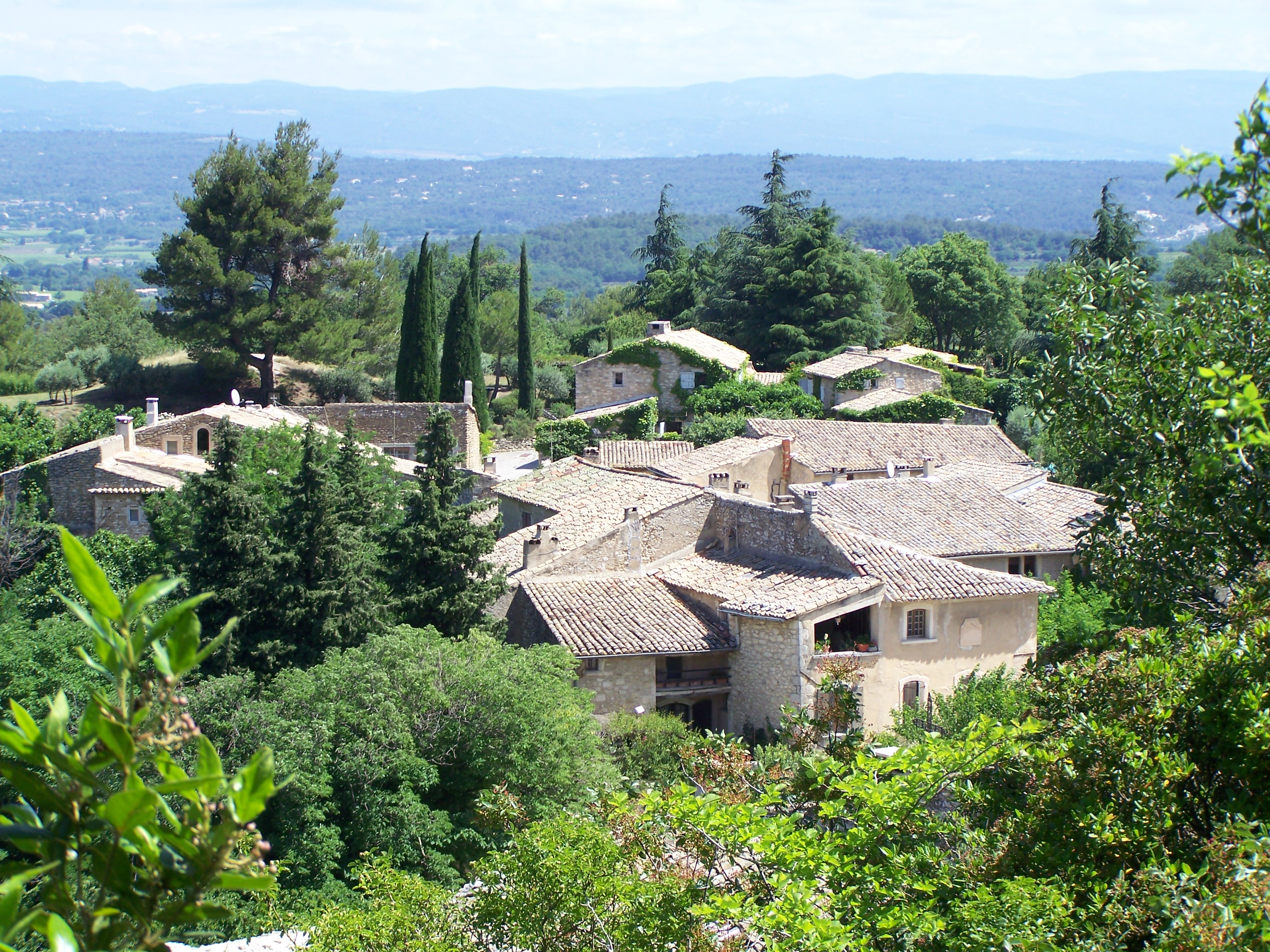 Oppède